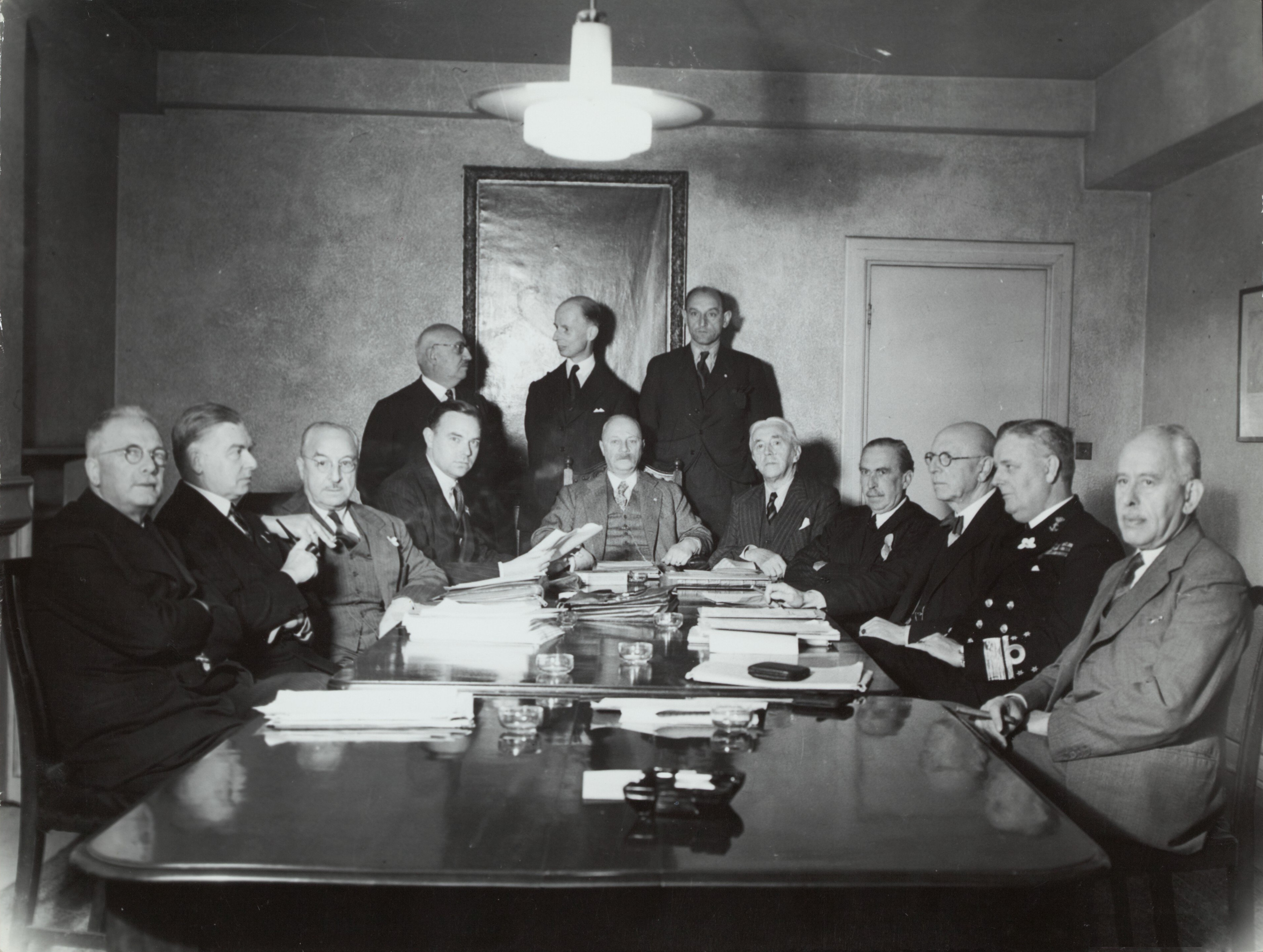 Collectie / Archief : Fotocollectie Rijksvoorlichtingsdienst Eigen Reportage / Serie : [ onbekend ] Beschrijving : De ministerraad te Londen in de tweede helft van 1944. Staande vlnr. Van Lidth de Jeude, Van Kleffens, Van Heuven Goedhart. Zittend vlnr. Van den Tempel, De Booy, Van den Broek, Burger, Gerbrandy, Bolkestein, Michiels van Verduynen, Albarda, Furstner en Van Boeijen Datum : 1944 Locatie : Londen Trefwoorden : bestuursfuncties, ministerraden, ministers Fotograaf : Fotograaf Onbekend / Anefo Auteursrechthebbende : Nationaal Archief Materiaalsoort : Foto (zwart/wit) Nummer archiefinventaris : bekijk toegang 2.24.10.02 Bestanddeelnummer : 137-1319